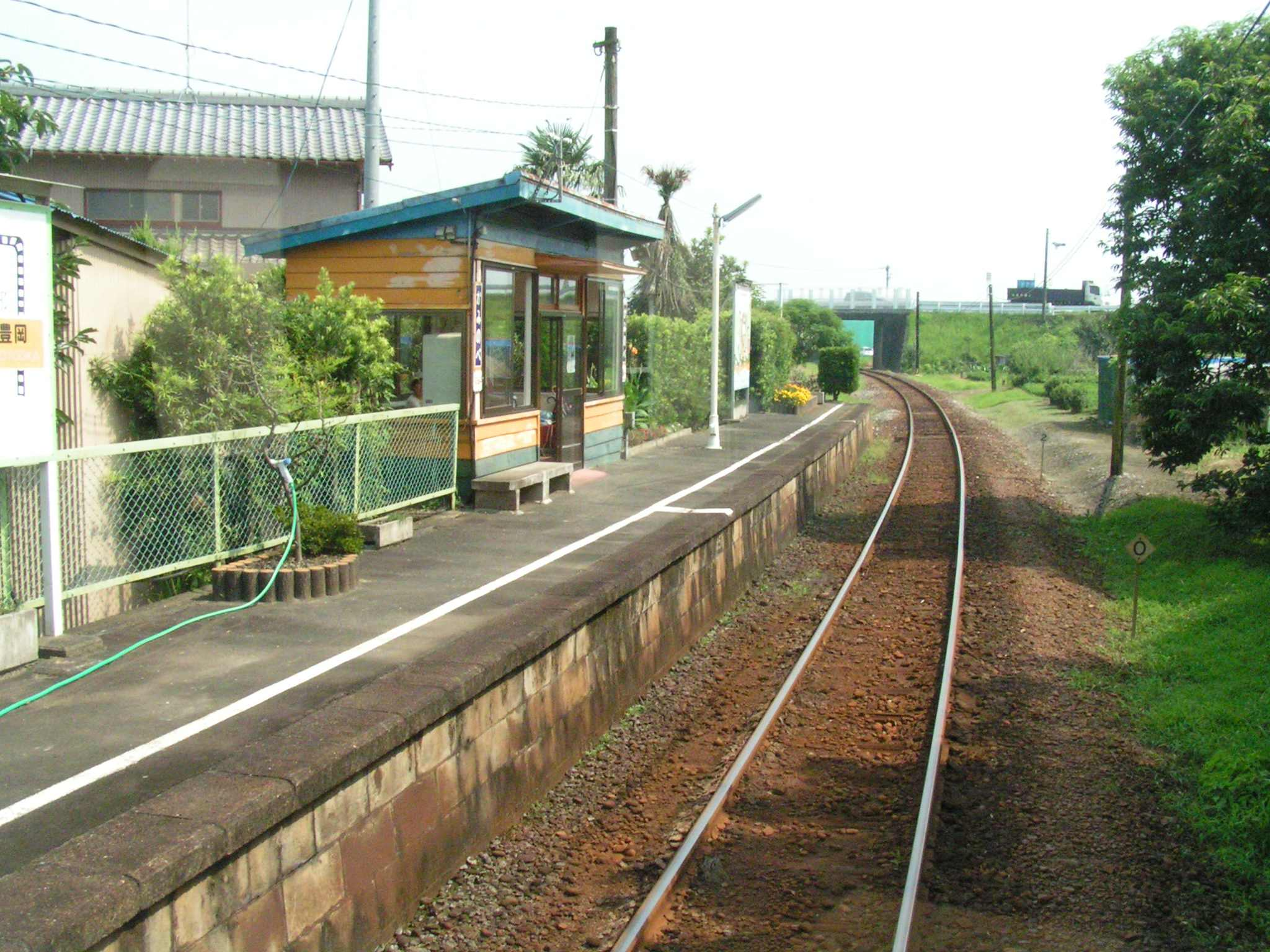 上野部駅